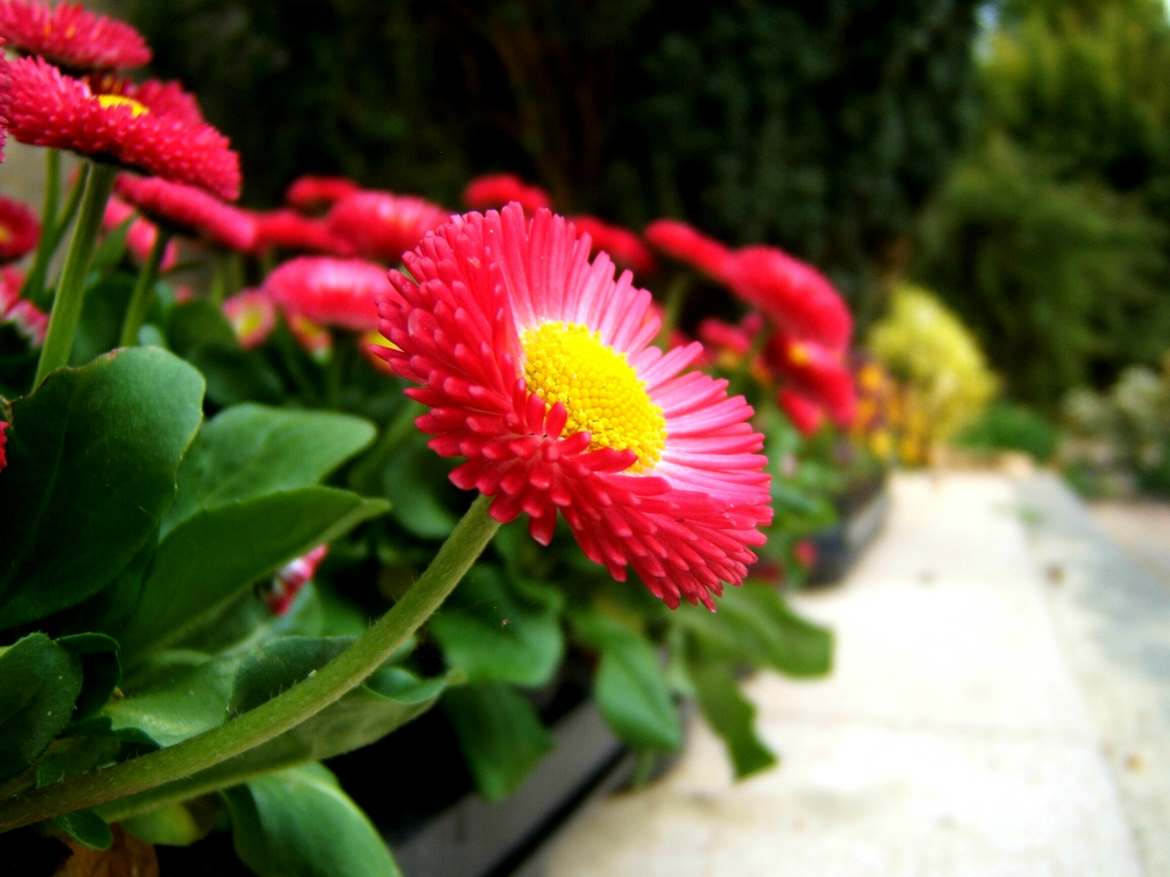 Categorie:Afbeelding plant